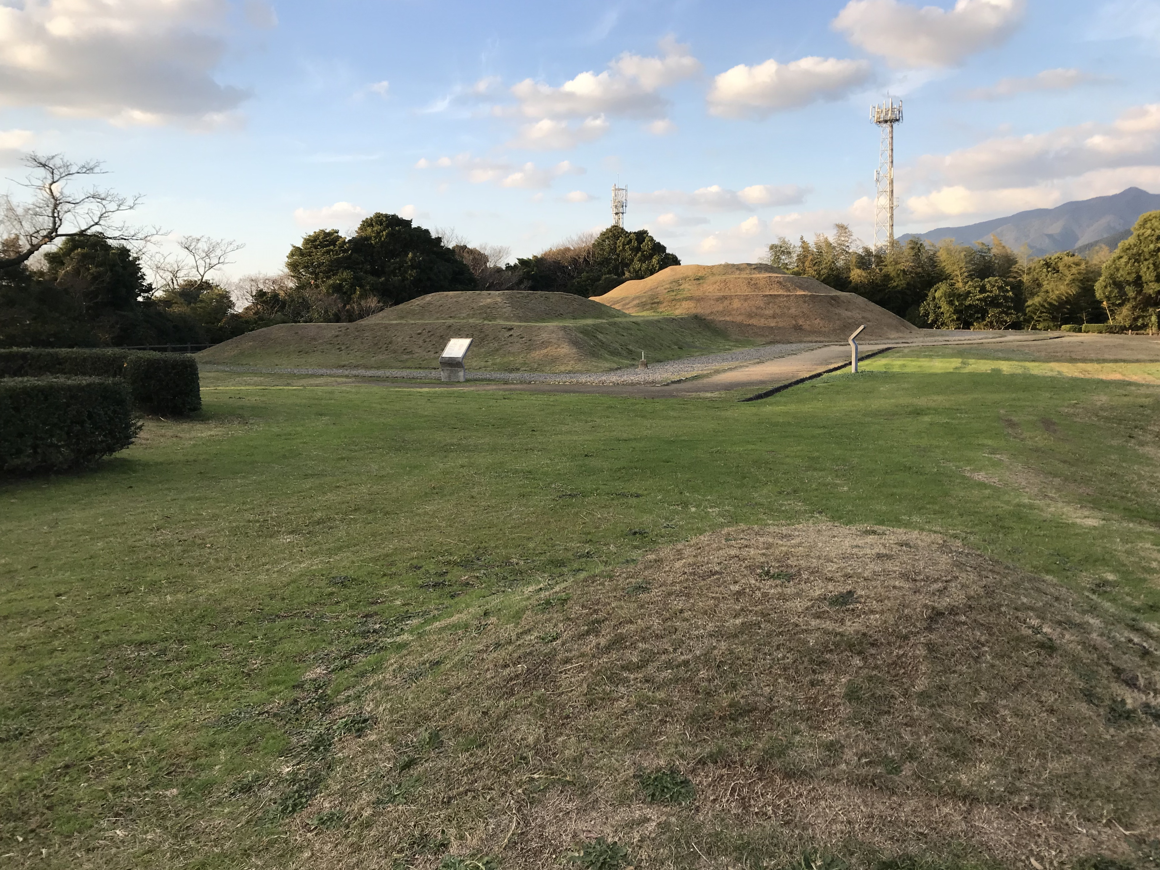 綾羅木郷遺跡・若宮4号古墳(手前)と若宮古墳(奥)